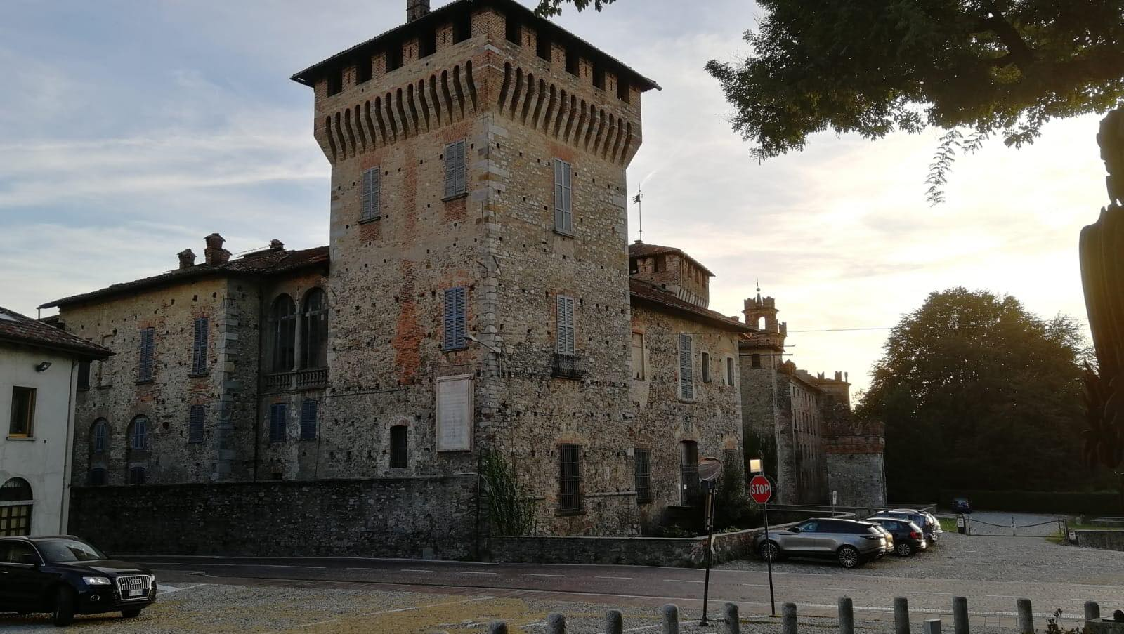 Castello Visconti di San Vito - Piazza Scipioni Publio Cornelio This is a photo of a monument which is part of cultural heritage of Italy.